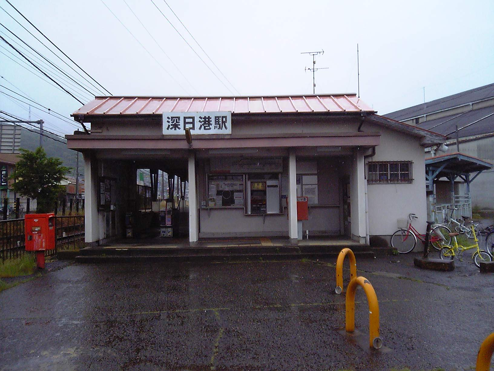 南海電鉄多奈川線深日港駅駅舎